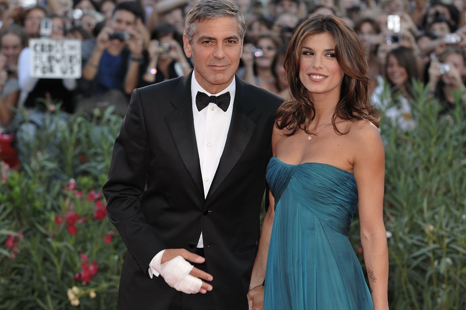 66ème Festival du Cinéma de Venise (Mostra), 6ème jour (07/09/2009) Tapis Rouge avec George Clooney et Elisabetta Canalis, Ewan McGregor et le réalisateur Grant Heslov pour le film : The men who stare at goats